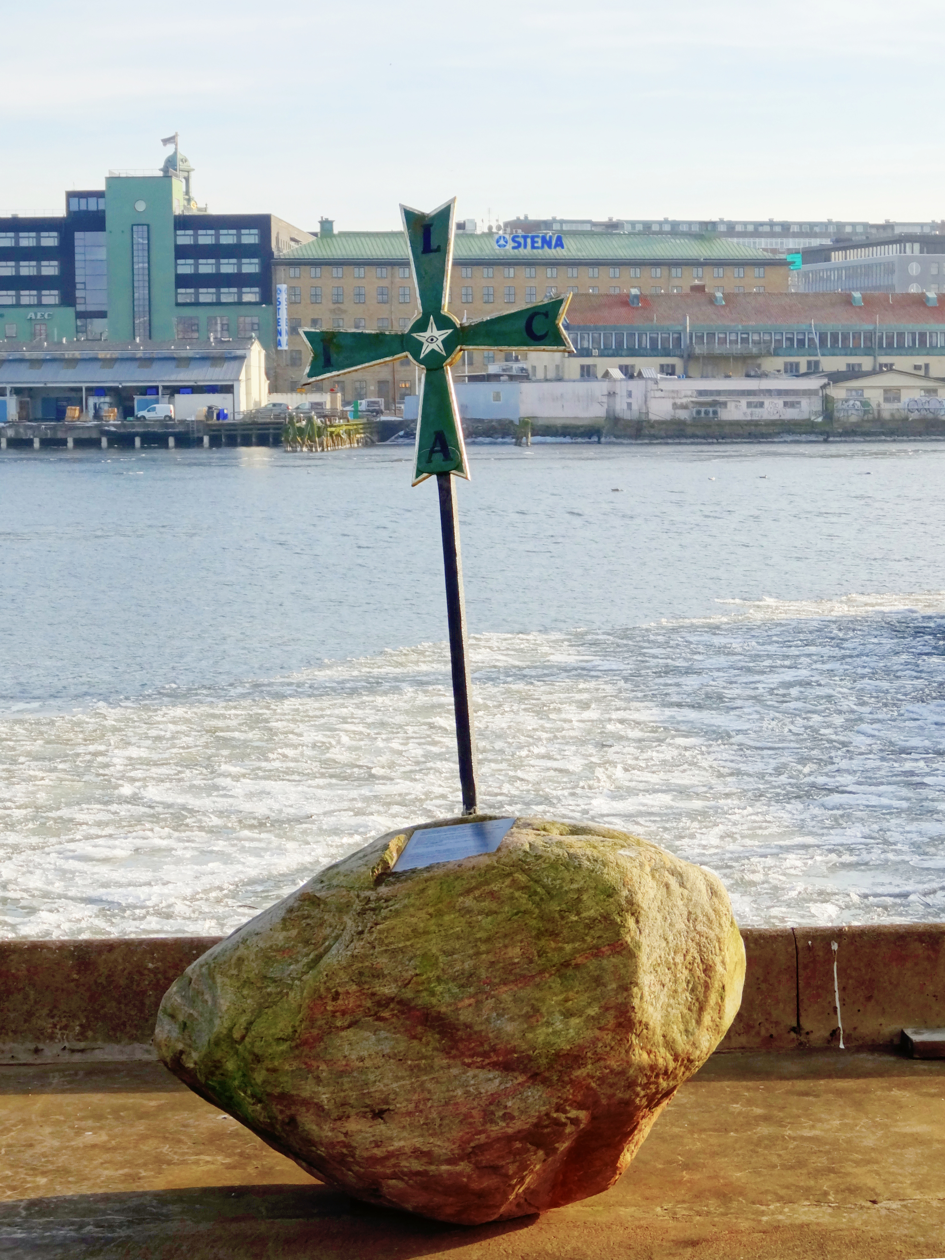 Ett Coldinukross på Pir Fyra i stadsdelen Eriksberg i Göteborg. Det placerades där den 18 augusti 1997 av Coldinuorden, enligt skylten på stenen.